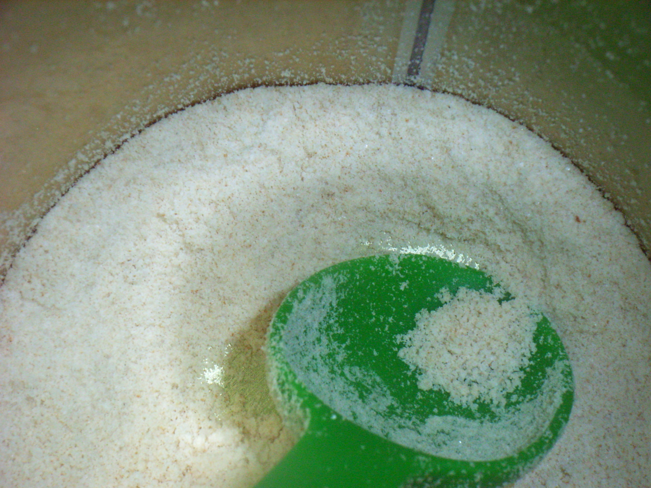 聯合利華產品家樂牌雞粉